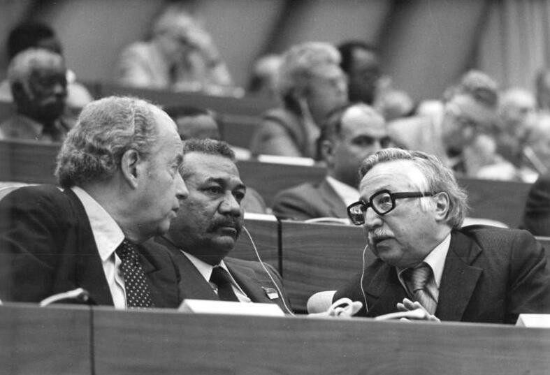 ADN-ZB-Mittelstädt-13.4.81-hü-Berlin: X. Parteitag- Blick auf das Präsidium mit Luis Corvalan (r.), Generalsekretär der KP Chiles, Juan Almeida Bosque, Mitglied des Politbüros und Sekretär des ZK der KP Kubas, und Rodney Arismendi (l.), Erster Sekretär der KP Uruguays.